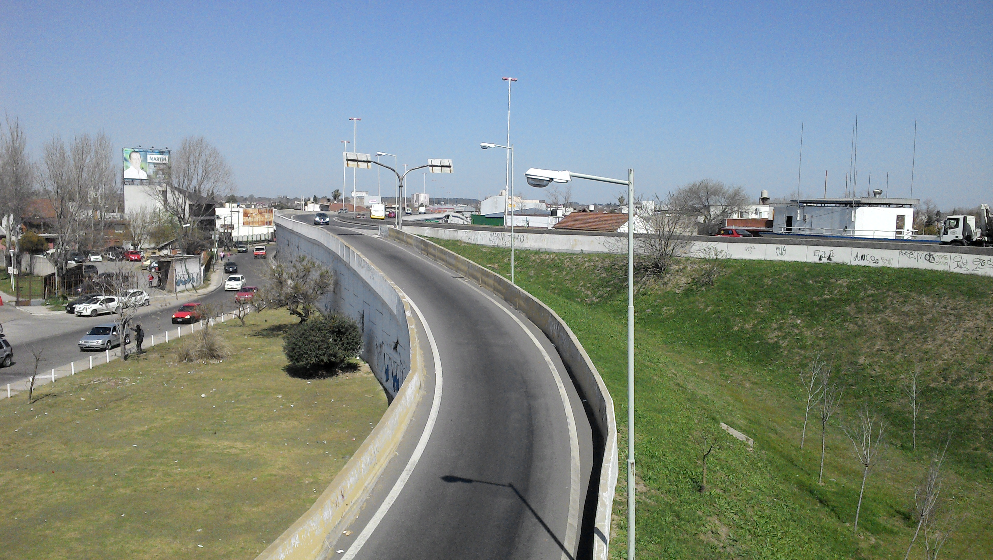 Villa Centenario, Buenos Aires Province, Argentina